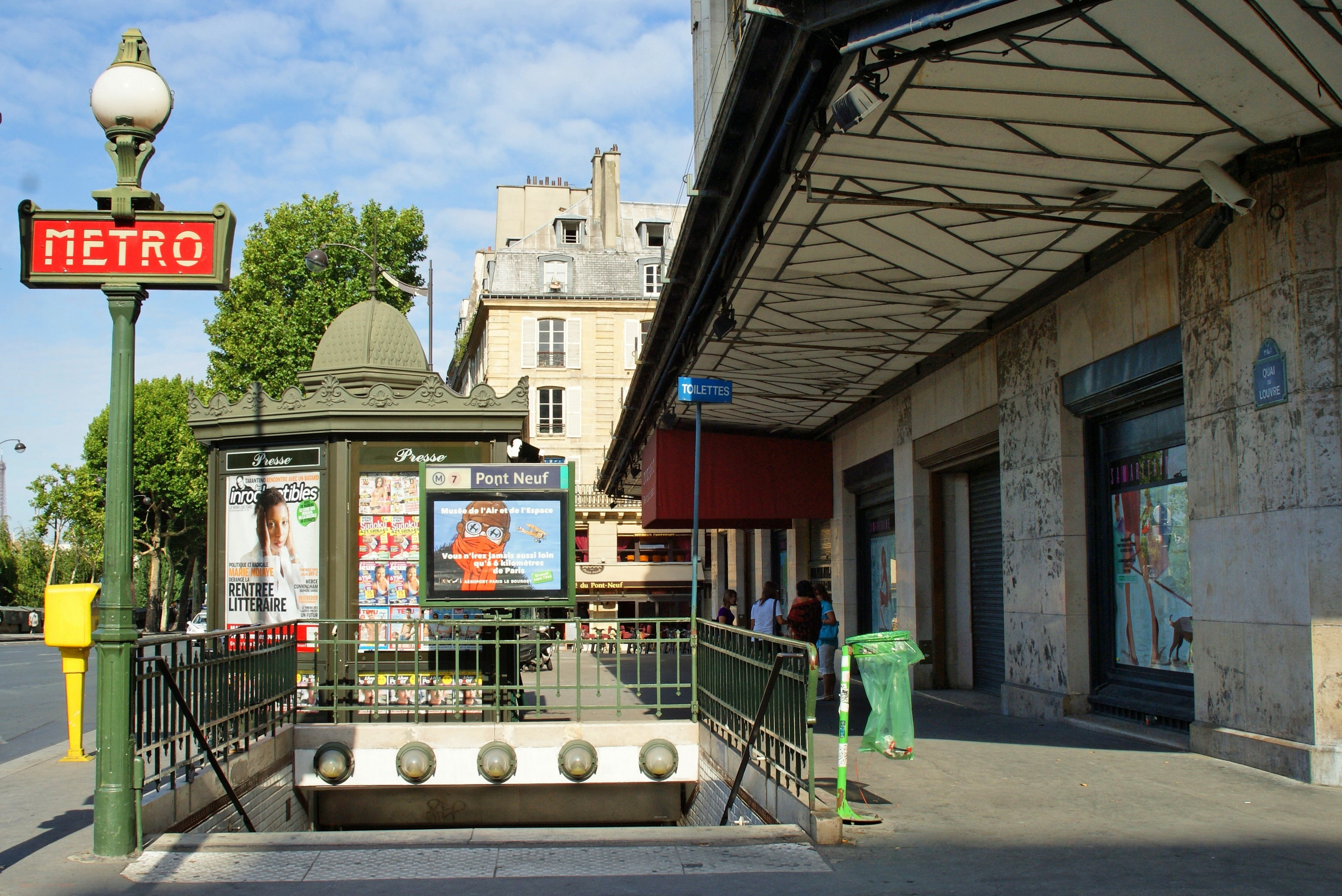 Station de Métro Pont Neuf avec candélabre Dervaux, kiosque à journaux et façade de La Samaritaine, Paris, France.